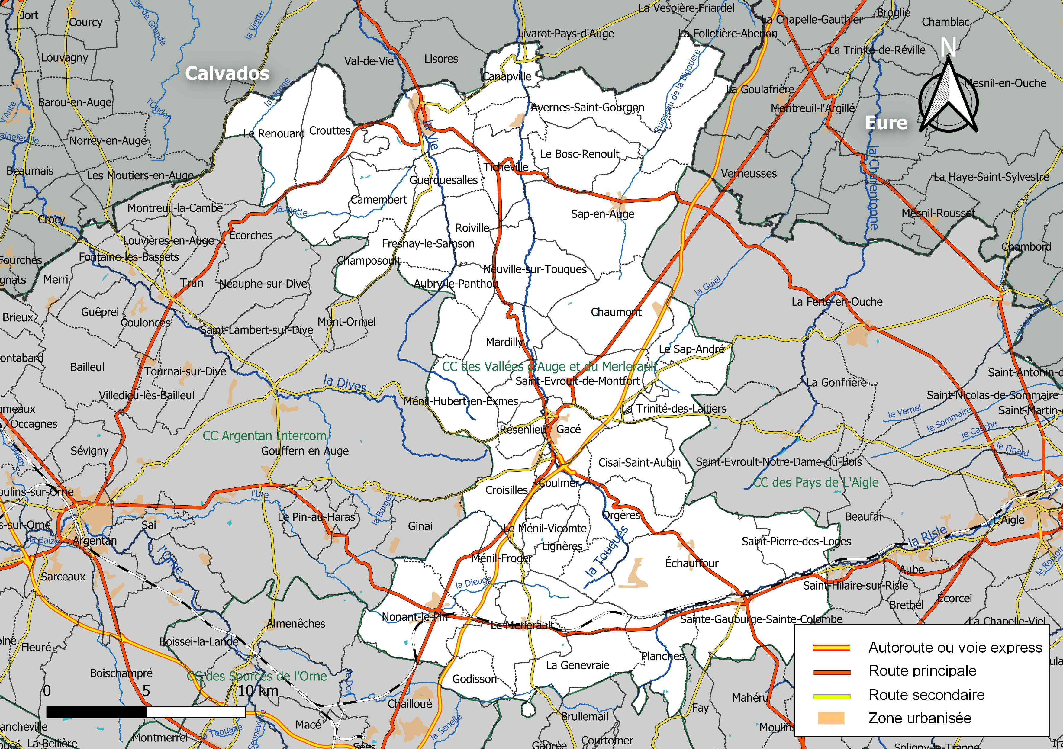 Carte géographique de la Communauté de communes des Vallées d'Auge et du Merlerault, département de l'Orne, France. Composition au 1er janvier 2019.